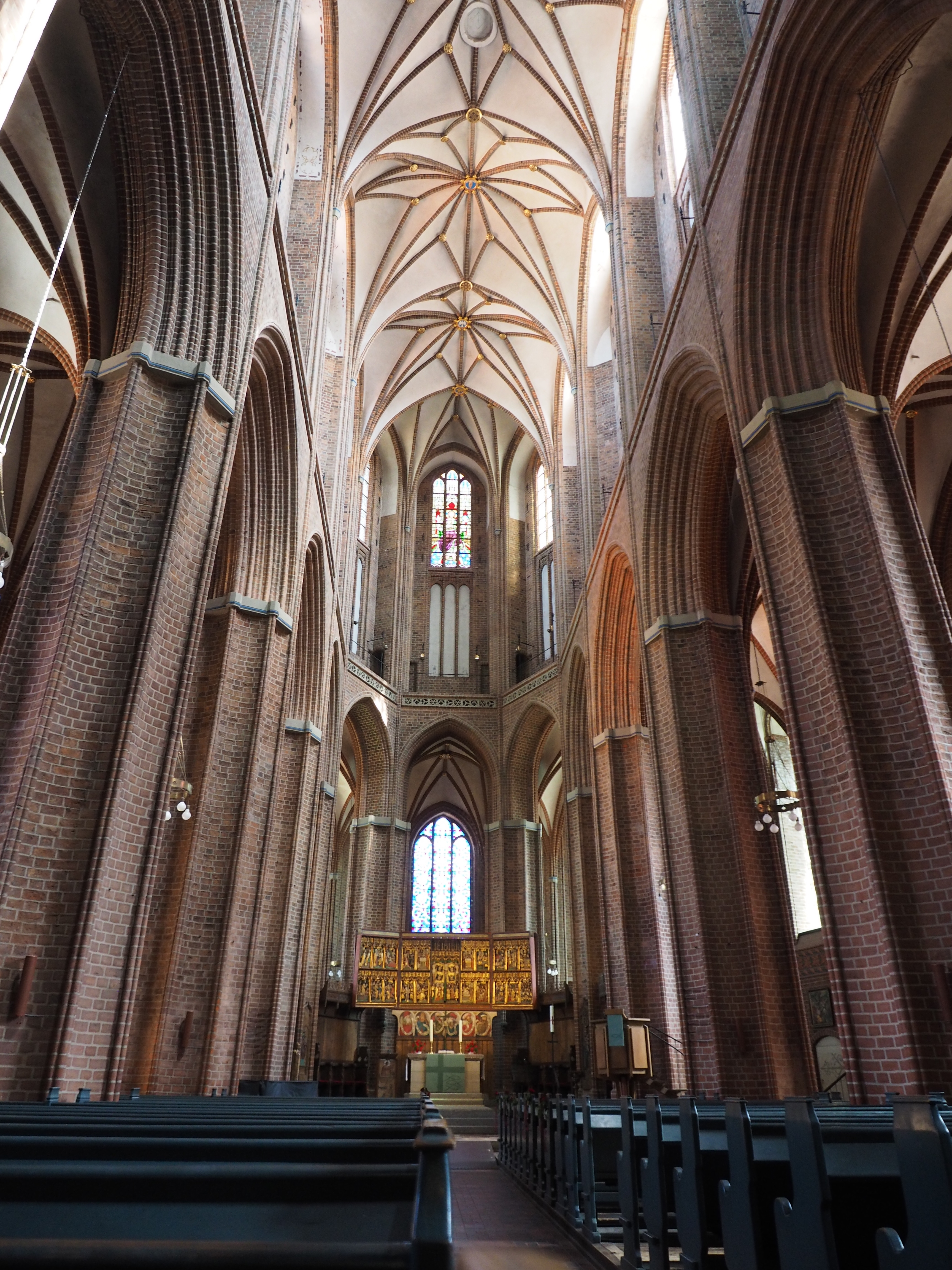 Langhaus und Altar St. Nicolai, Lüneburg